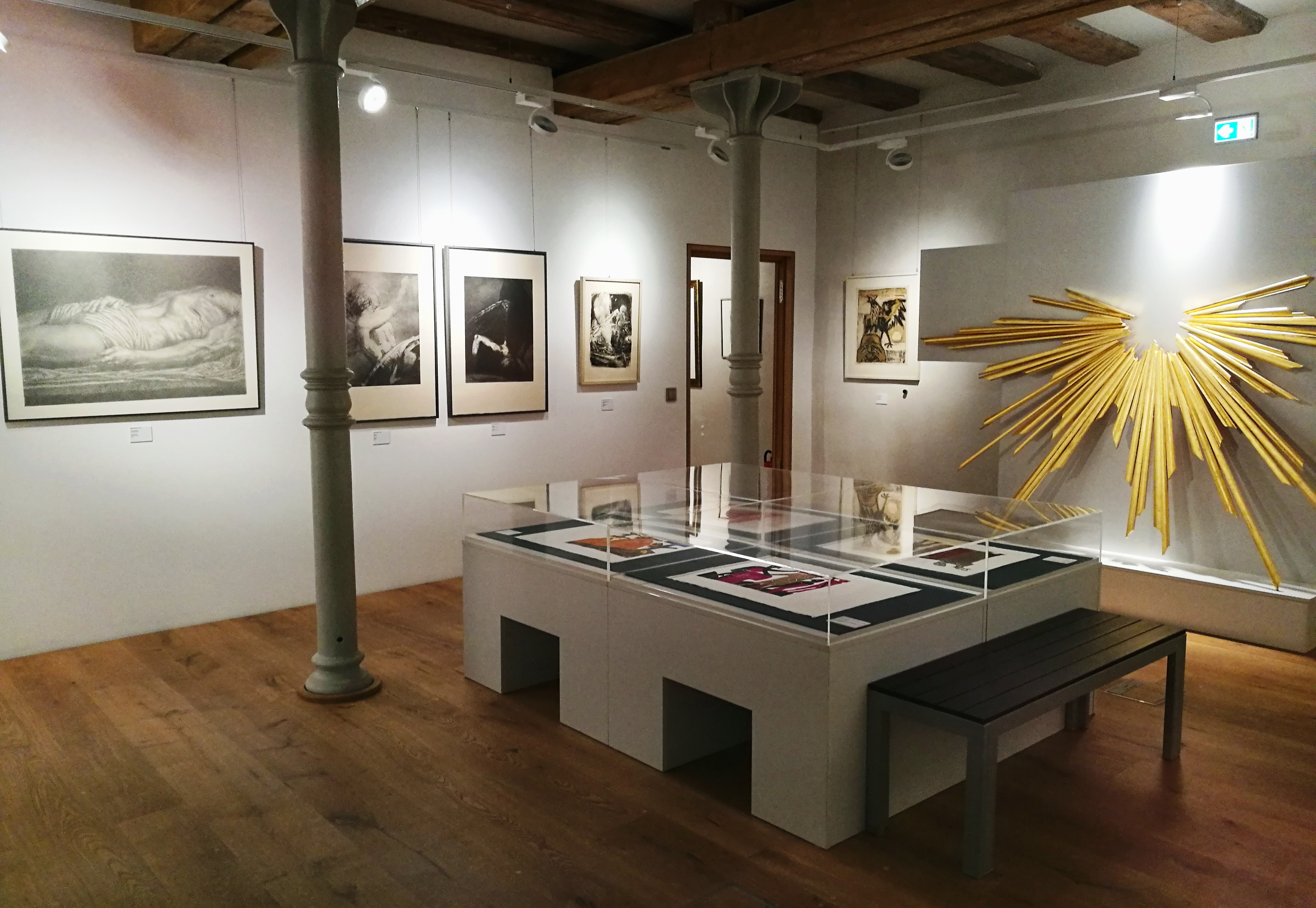 Blick in die Ausstellung mit Werken von Edgar Knobloch, Michael Triegel, Bernhard Heisig, Otto Dix (Zeichnungen und Graphikenan den Wänden), Thomas Straub (Aureole) und HAP Grieshaber (Vitrine)